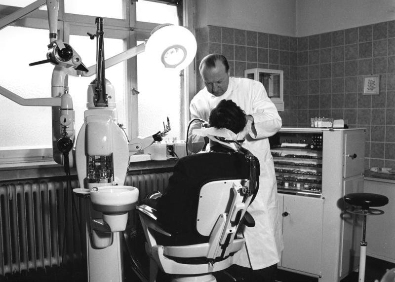 Firma Krupp, Essen Krupp'sche Zahnklinik